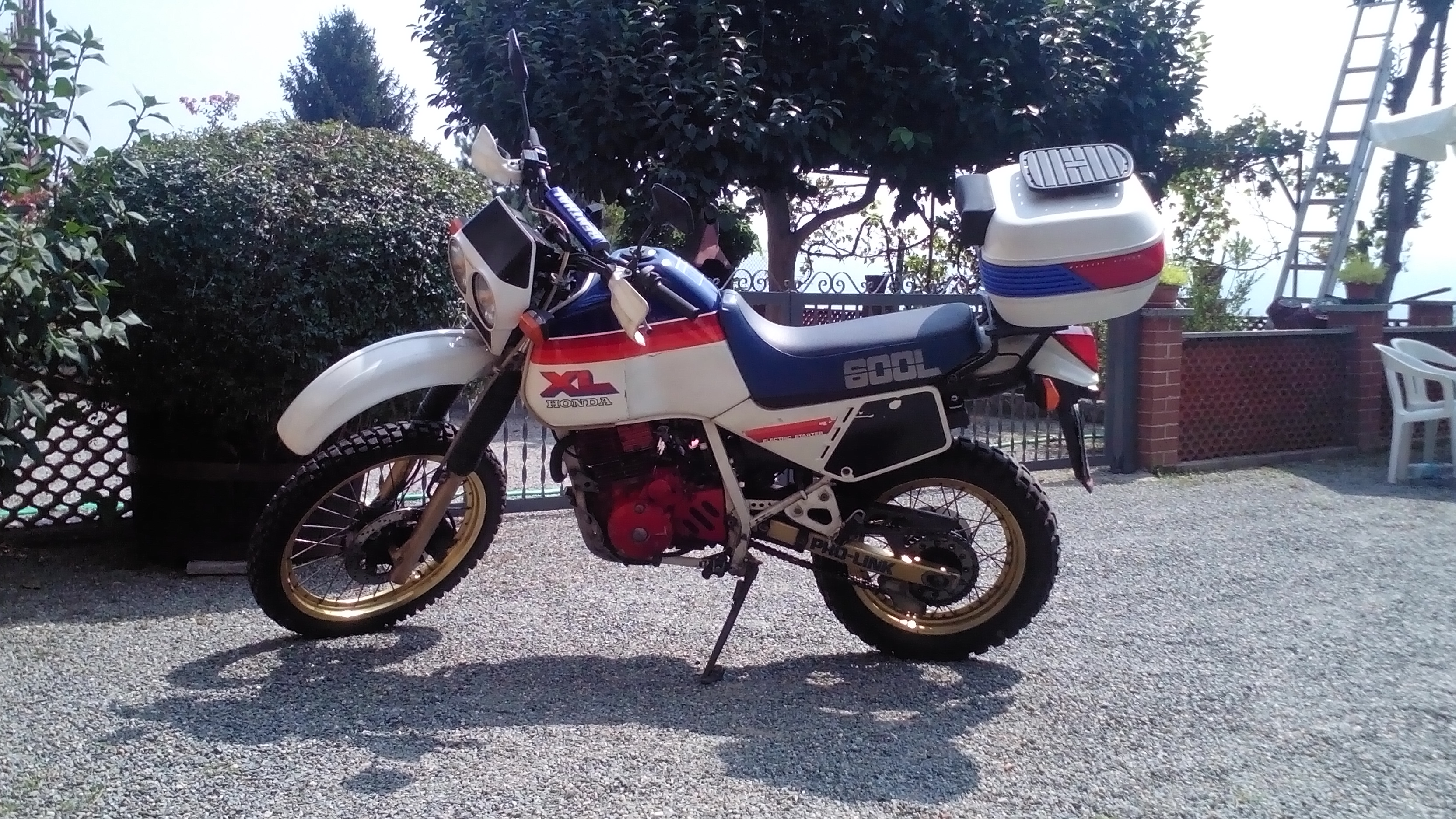 Honda XL 600 LM, con bauletto Givi Maxia